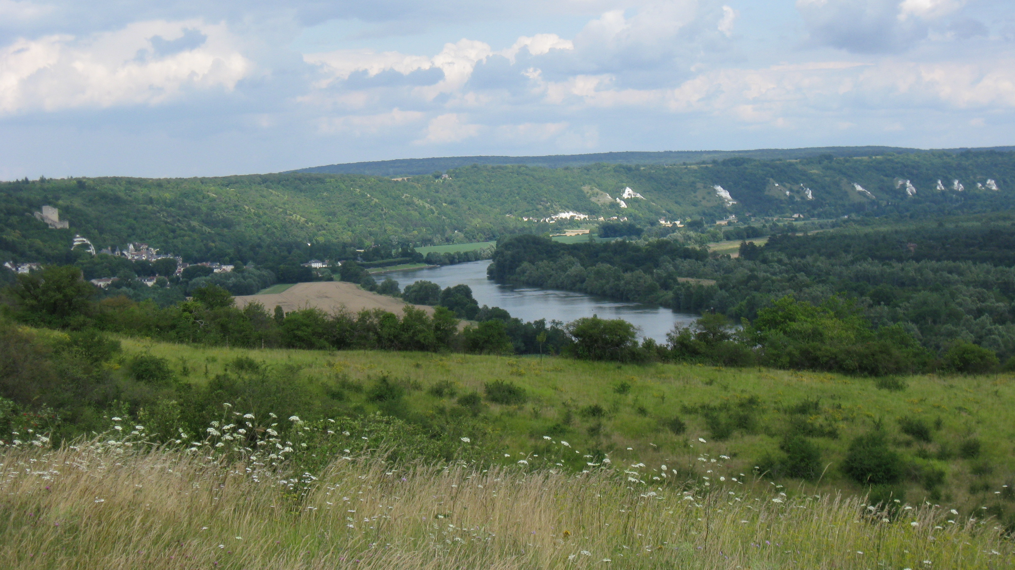 Vue de la réserve naturelle nationale des « Coteaux de la Seine » depuis la commune de Gommecourt. (Yvelines, région Île-de-France).